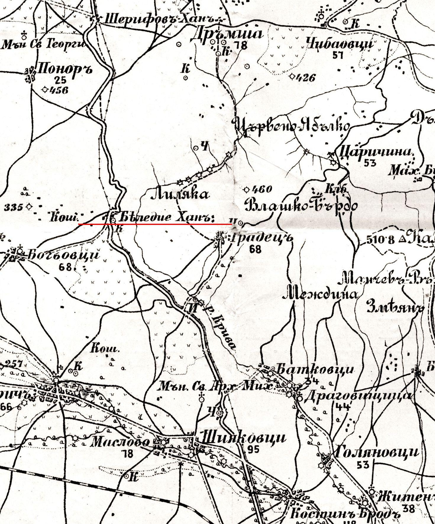 Сканирана старинна карта на Беледие хан, хижа Люляка и околните местности. Картата е от около 30-те години на миналия век. Ясно се вижда изписването на името на селището, както и околните забележителности.